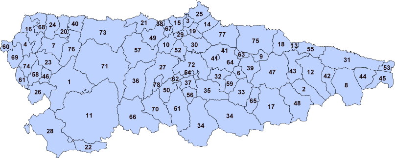 Mapa de conceyos d'Asturies